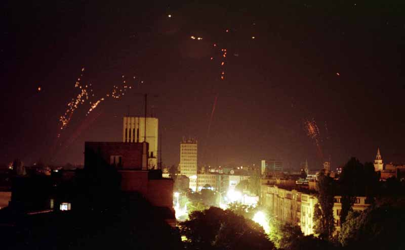 Нато бомбардовање СР Југославија.Против ваздушна одбрана покушава да обори НАТО бомбардере \ Nato bombardovanje SR Jugoslavija. Protiv vazdušna odbrana pokušava da obori NATO bombardere.